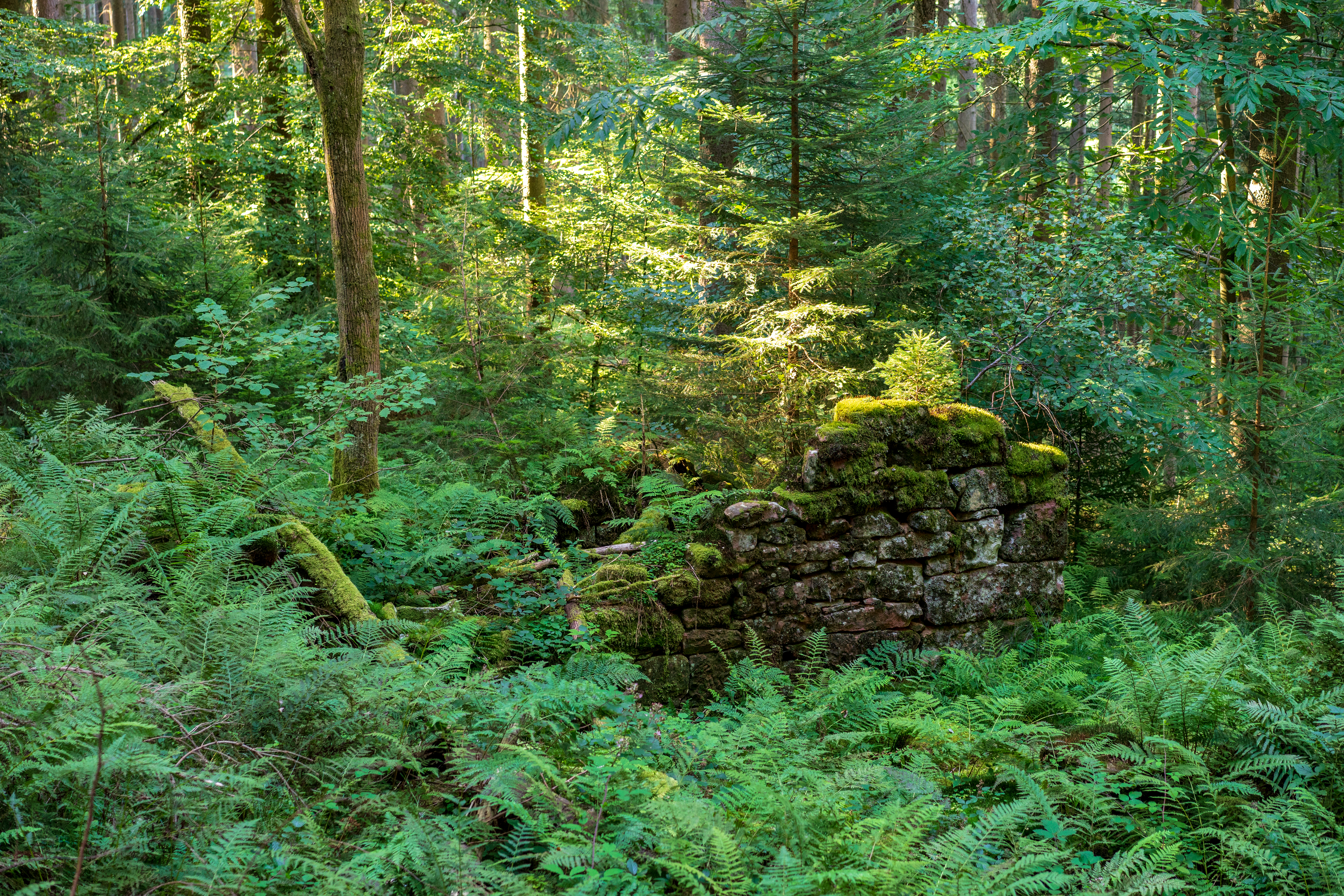 Von der Natur zurückeroberte Ruine eines Hauses im aufgelassenen Weiler Unterferdinandsdorf am Nordhang (zum Reisenbachtal hin) des Winterhauchs bei Waldbrunn. Von dem um 1850 aufgegebenen Weiler zeugen nur solche Mauerreste, die zeigen, wie die Natur menschliche Siedlungen zurückbaut und sie sich zunutze macht. Die Reste von Unterferdinandsdorf liegen laut Karte am Rand des Landschaftsschutzgebietes „Reisenbachtal“ (Schutzgebiets-Nr. 2.25.001). Laut dem offiziellen Schutzgebiets-Steckbrief zählen die Ruinen mit zum Landschaftsschutzgebiet („Tief eingeschnittenes Odenwaldtal mit Mauerresten der 1850 abgegangenen Siedlung Ferdinandsdorf“ – hier muss Unterferdinandsdorf gemeint sein, denn Oberferdinandsdorf lag ein ganzes Stück südwestlicher).